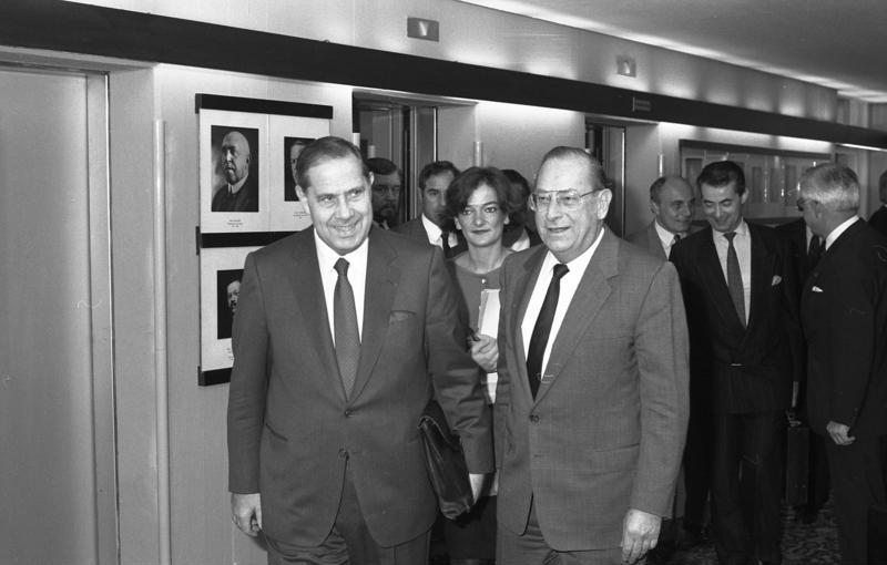 15.10.1987 Bundesminister Dr. Friedrich Zimmermann empfängt den französischen Innenminister Charles Pasqua, im Bundesministerium des Innern